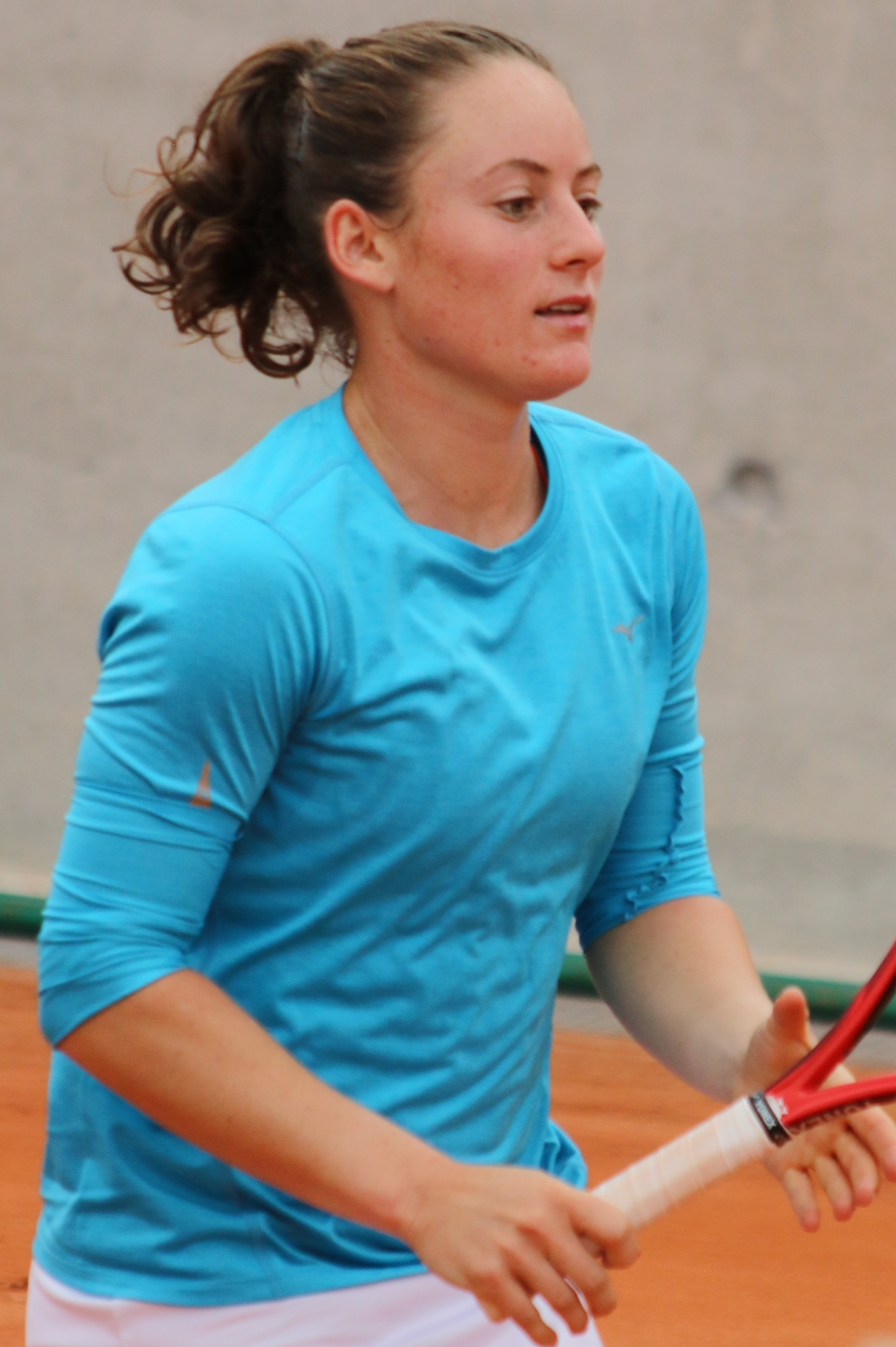 Zidansek RG19 (23)